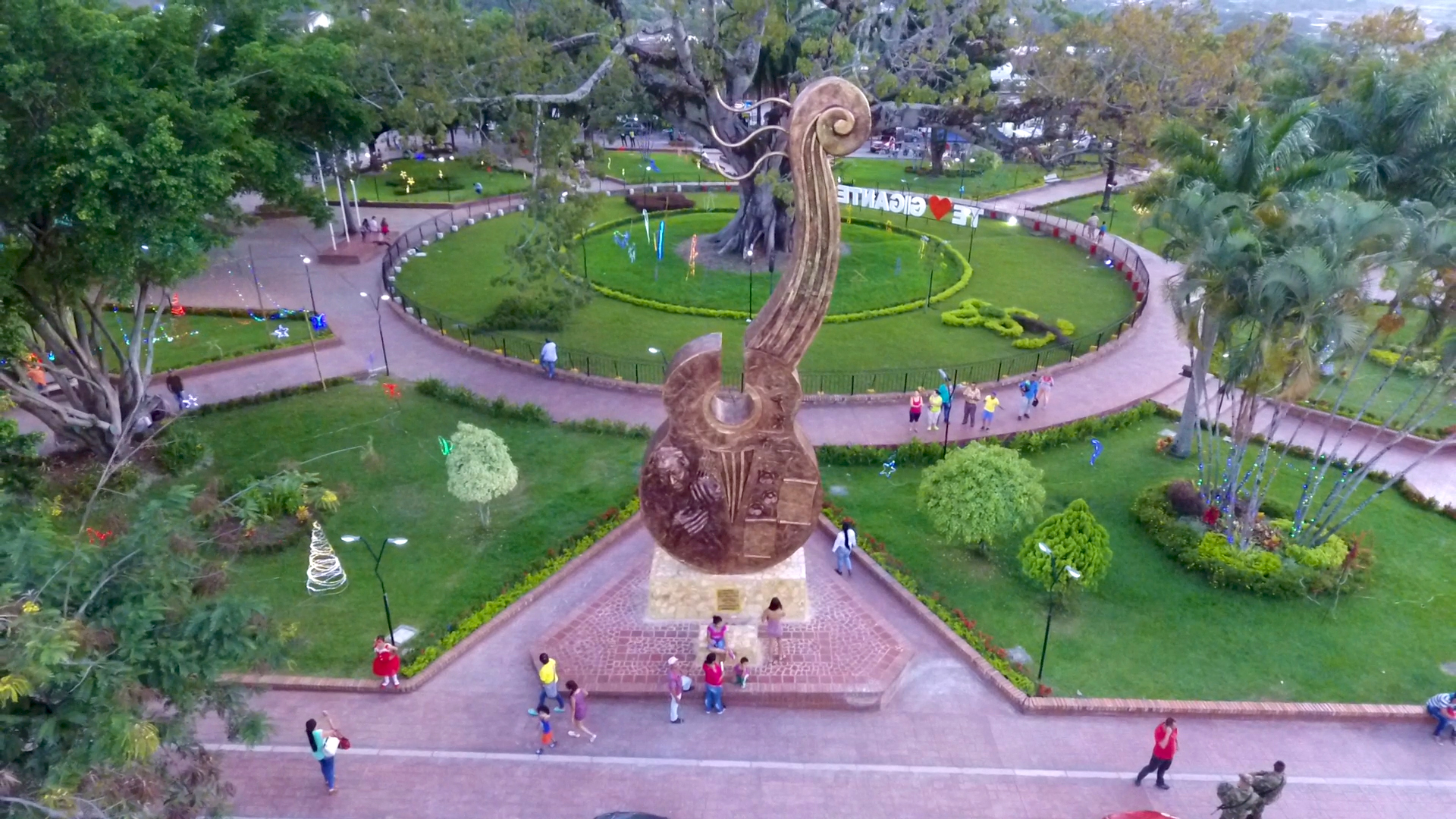 Parque Principal, Monumento Guitarra